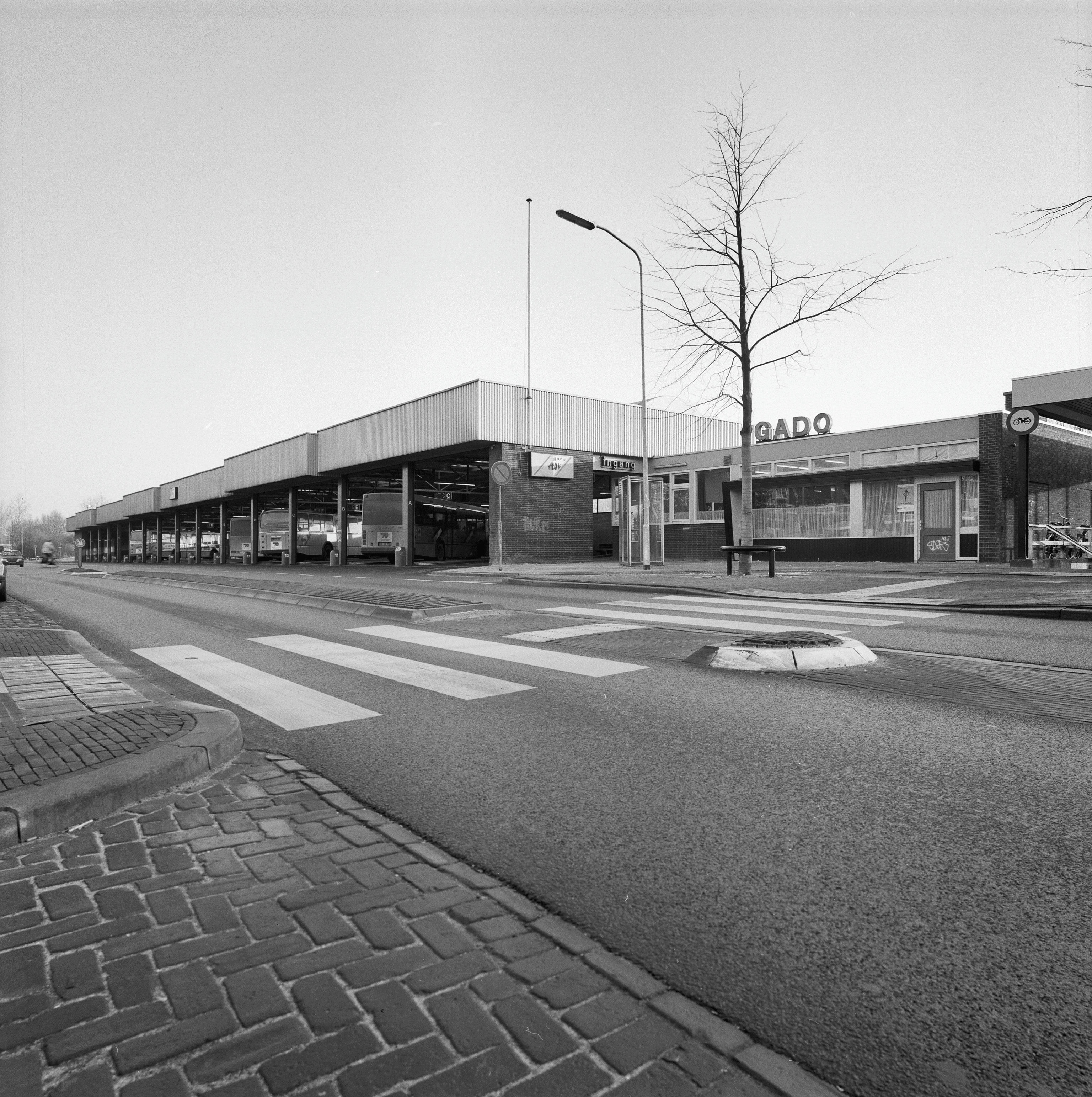 G.A.D.O. Busstation: Overzicht busstation (opmerking: Gefotografeerd voor 101 Industriële Monumenten (P.Nijhof))